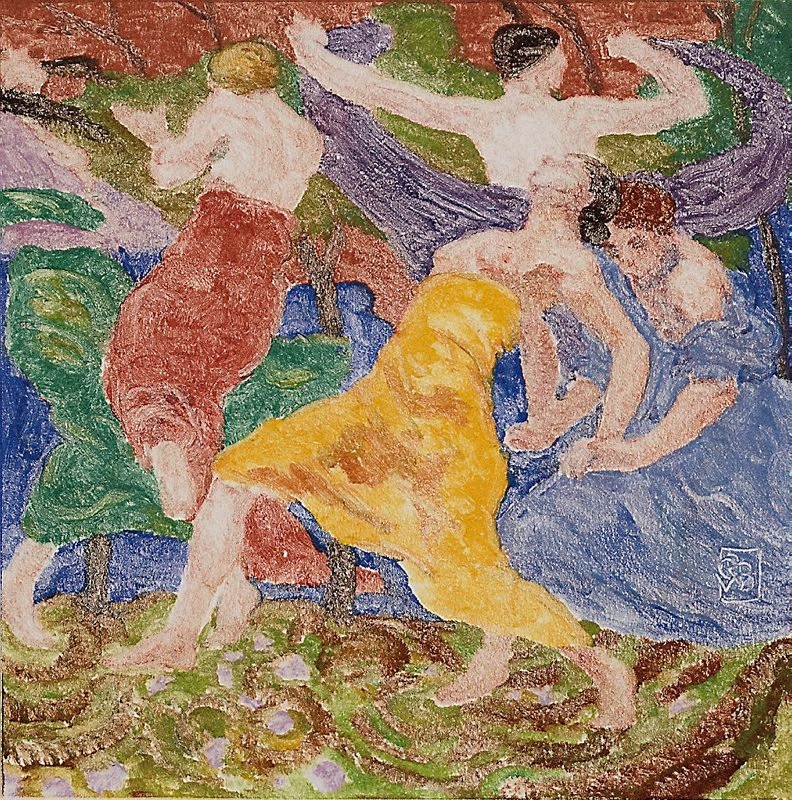 Fresque